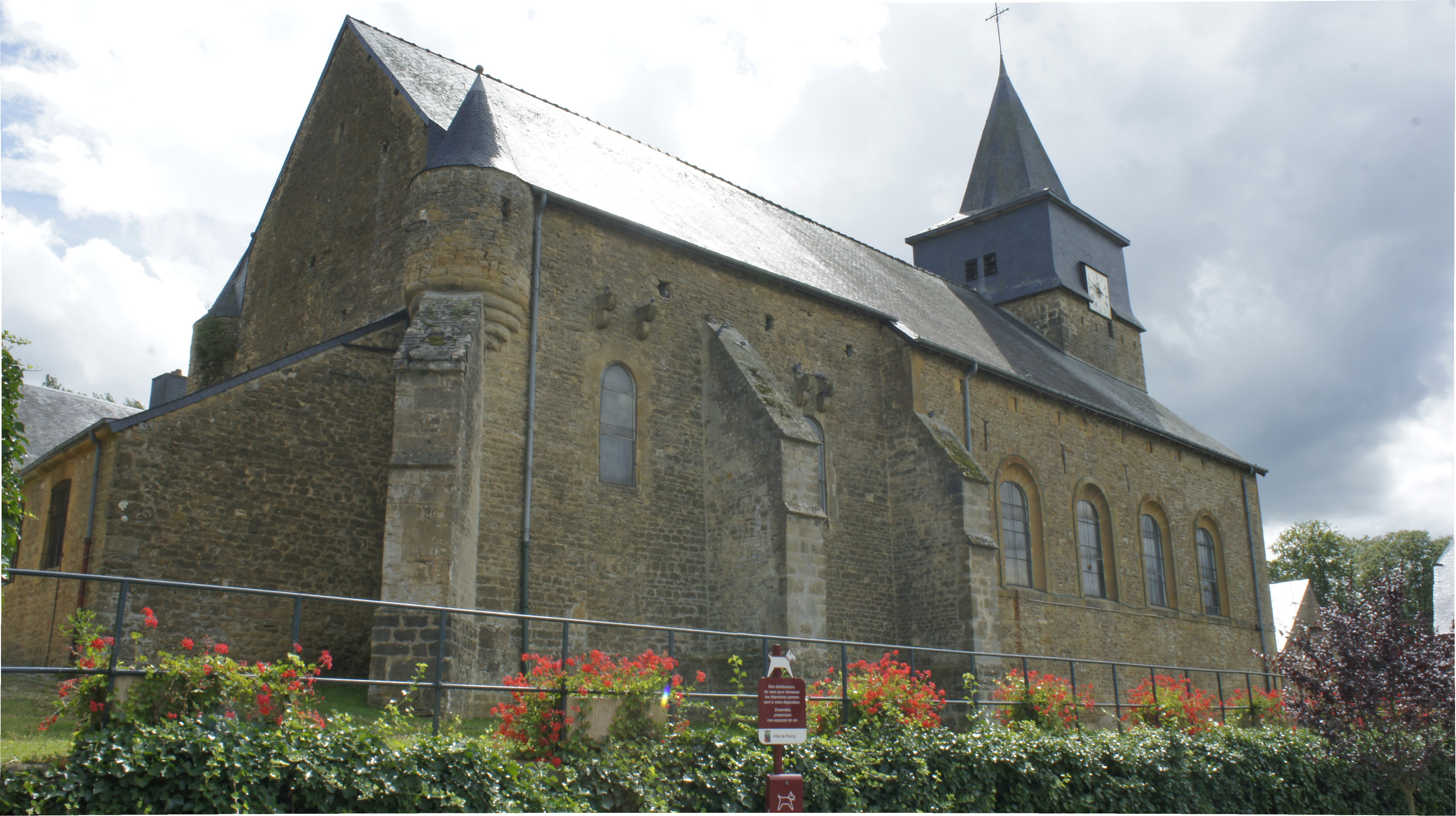 Eglise st-Rémi dans le village ardennais de Floing. .